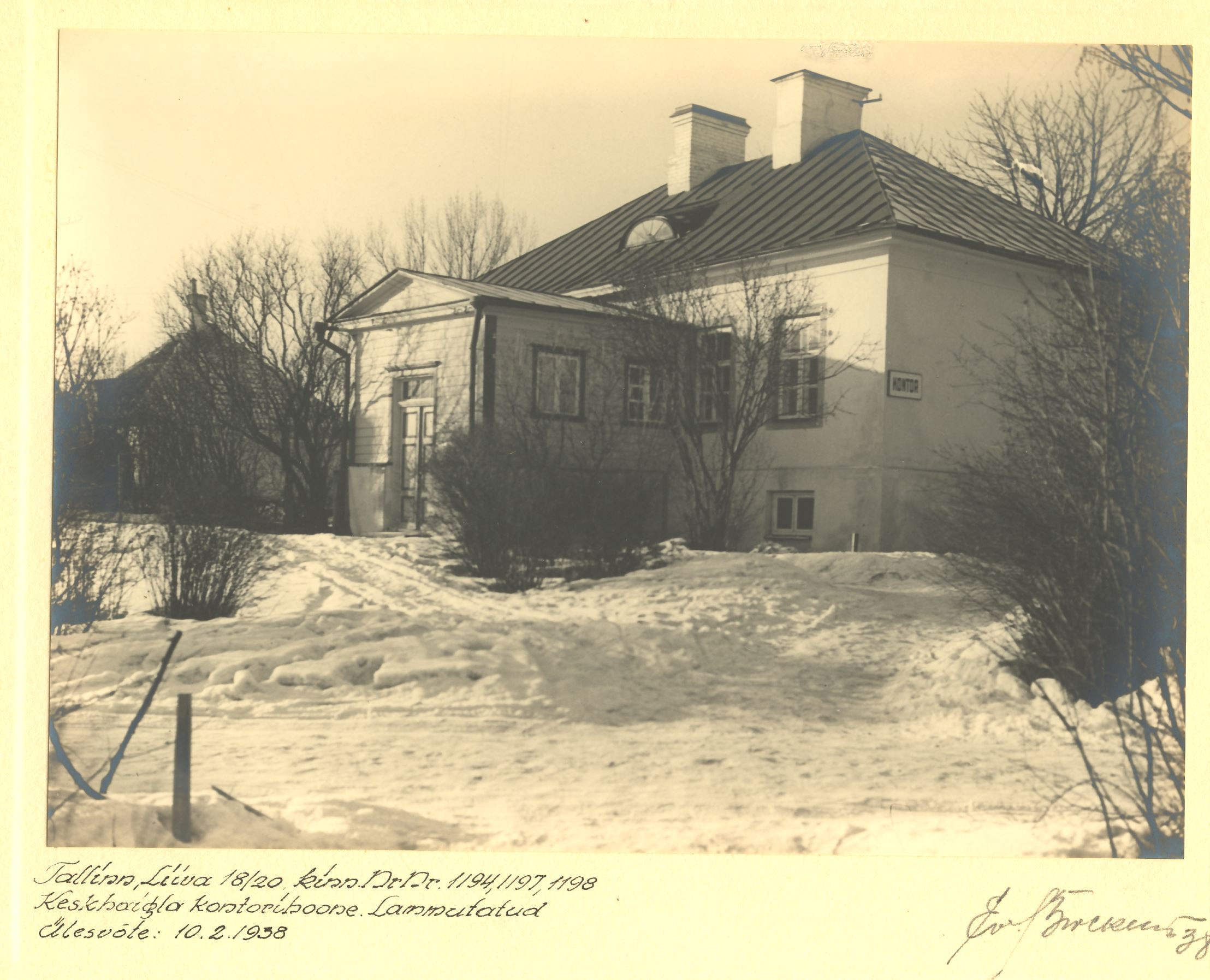 Liiva 1820, kinnistu nr 119 , 1197 1198. Keskhaigla kontorihoone